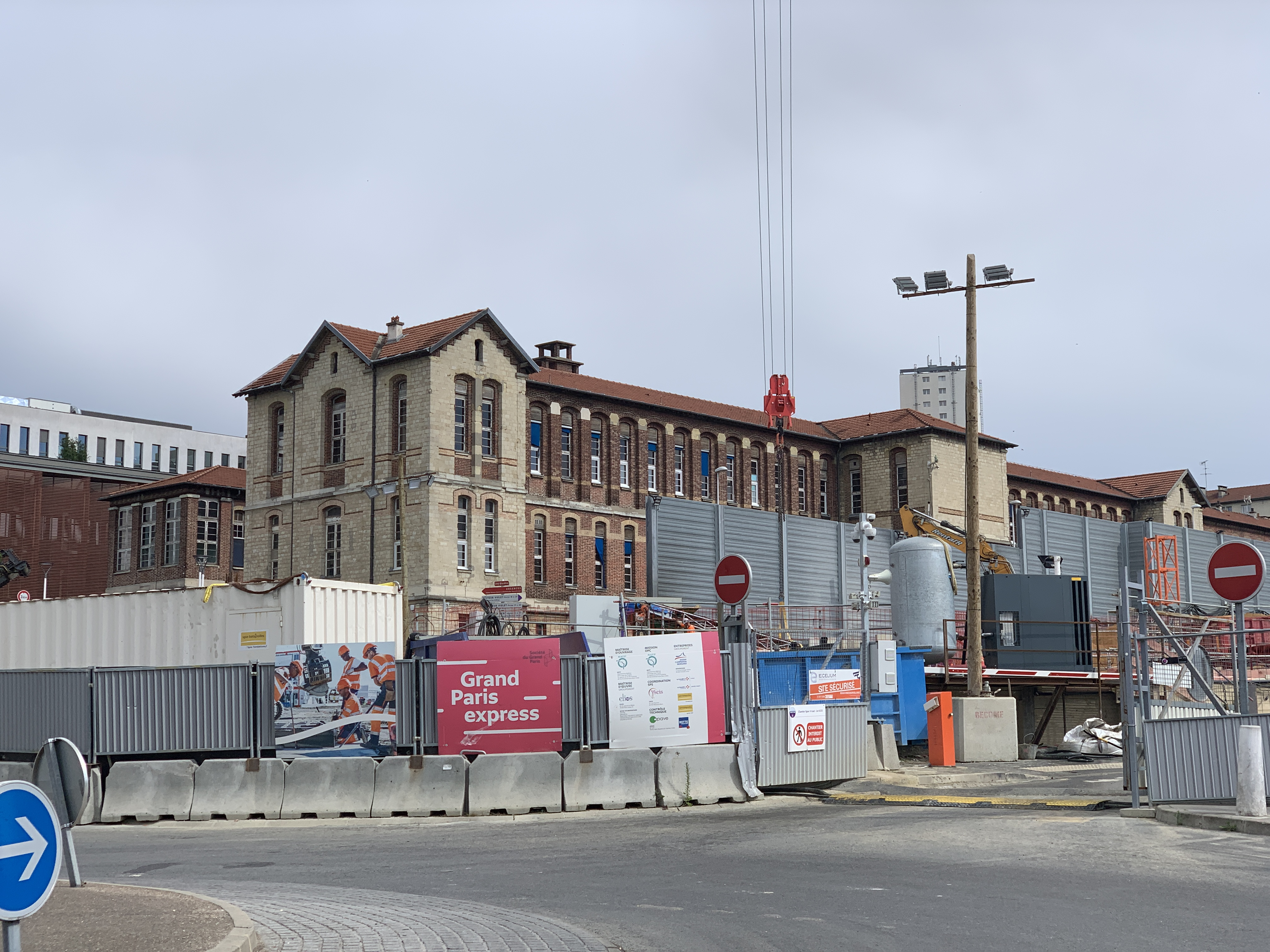 Chantier de la station de métro Le Kremlin Bicêtre - Hôpital, ligne 14 du métro de Paris, Le Kremlin-Bicêtre.